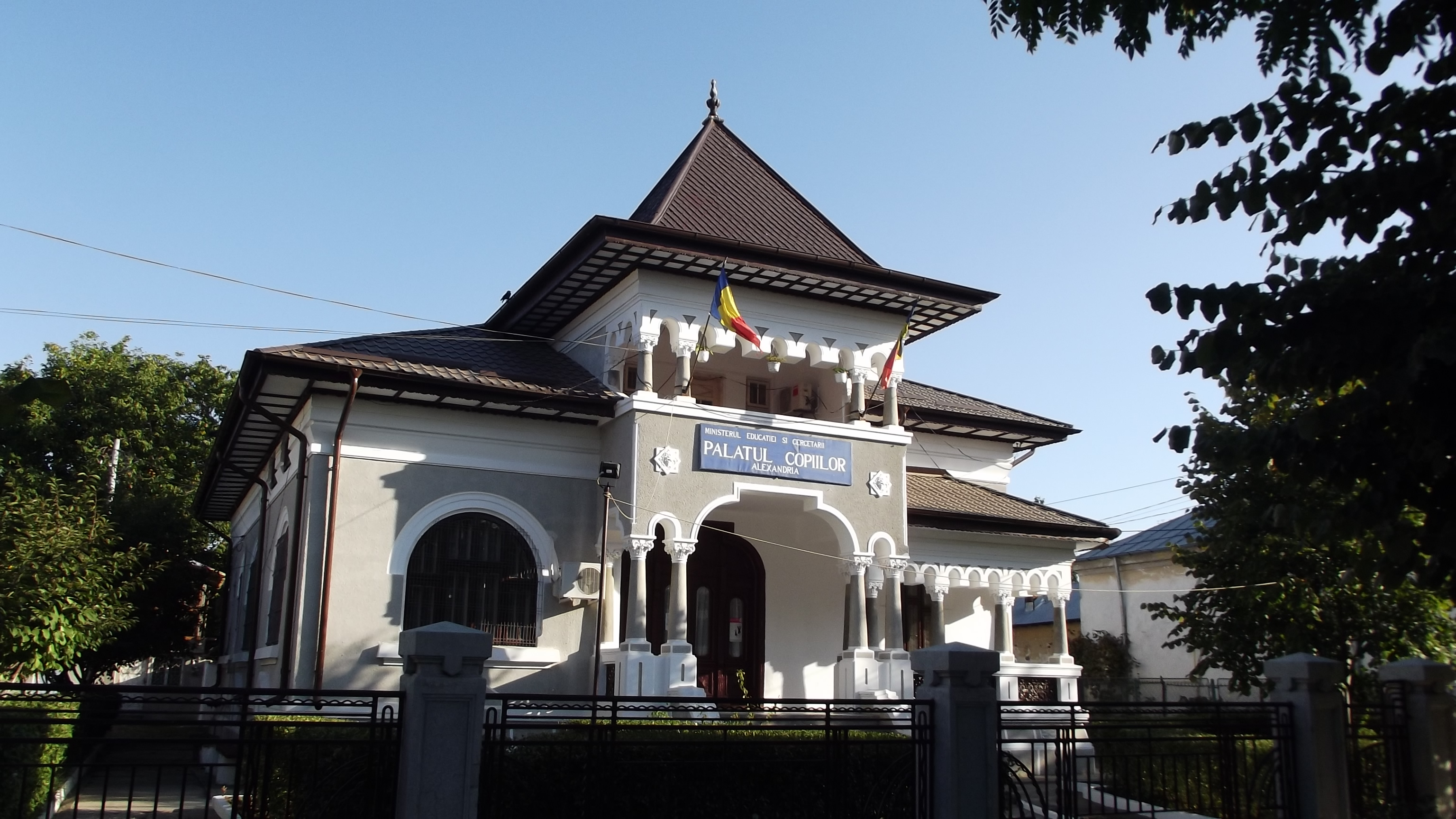 Alexandria-Teleorman-Ro: Casa Zarzară, fosta "Casa pionierilor", azi "Palatul copiilor". Construita in 1932.